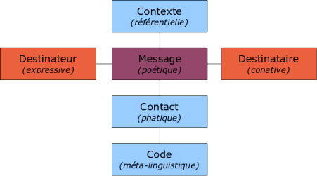 Le schéma général de la communication humaine, d'après Jakobson, 1963. (entre parenthèses, les fonctions de communications associées).